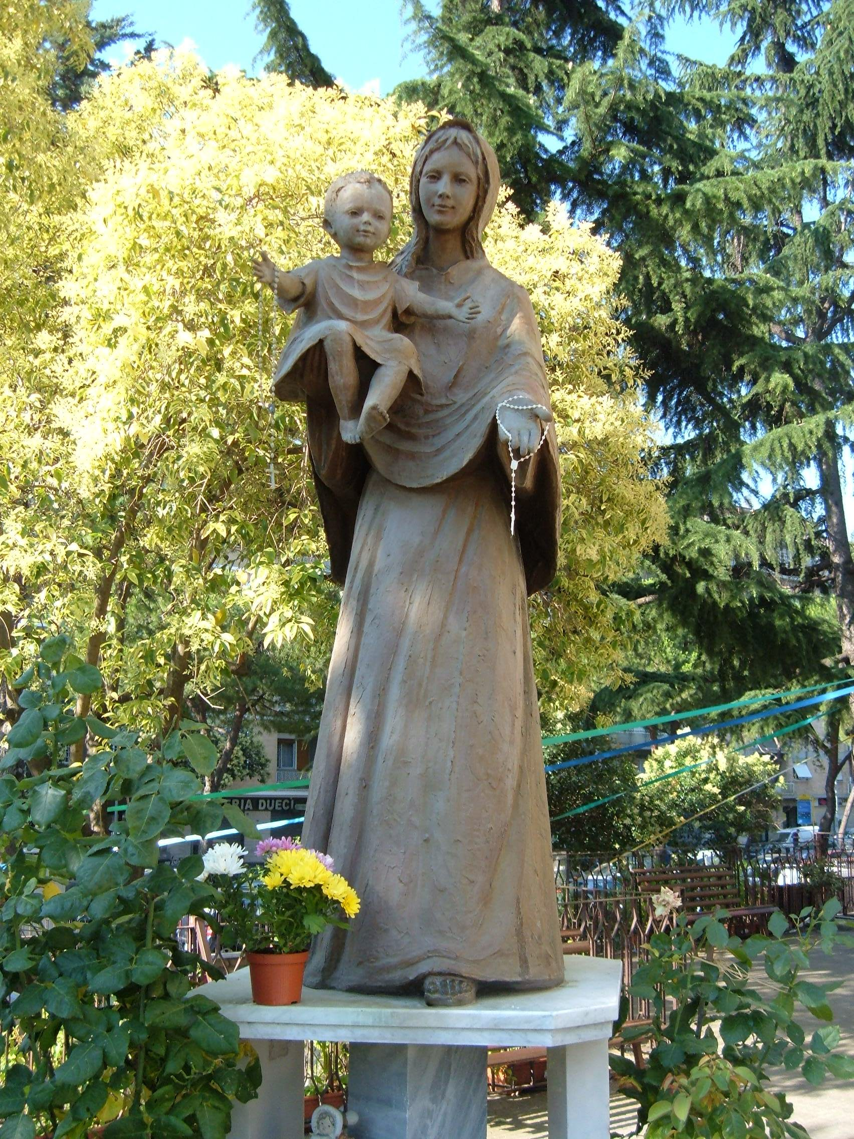 Chiesa di Santa Silvia, a Roma, nel quartiere Portuense.